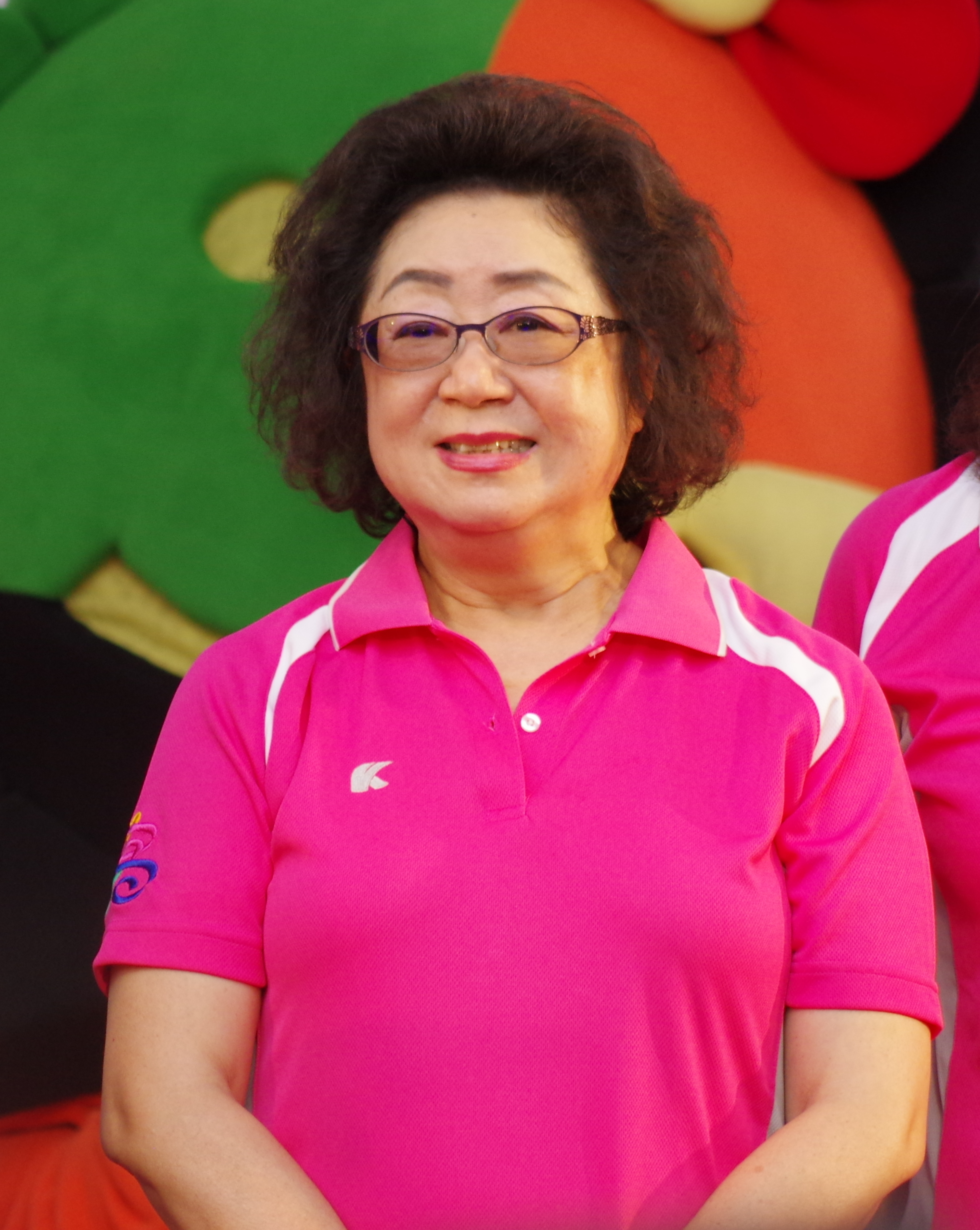 高雄市政府教育局局長范巽綠。